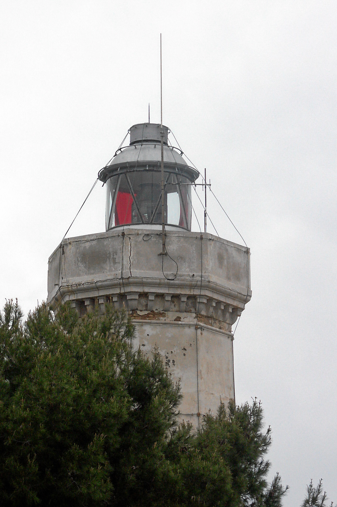 Leuchtturm Capo Rizzuto